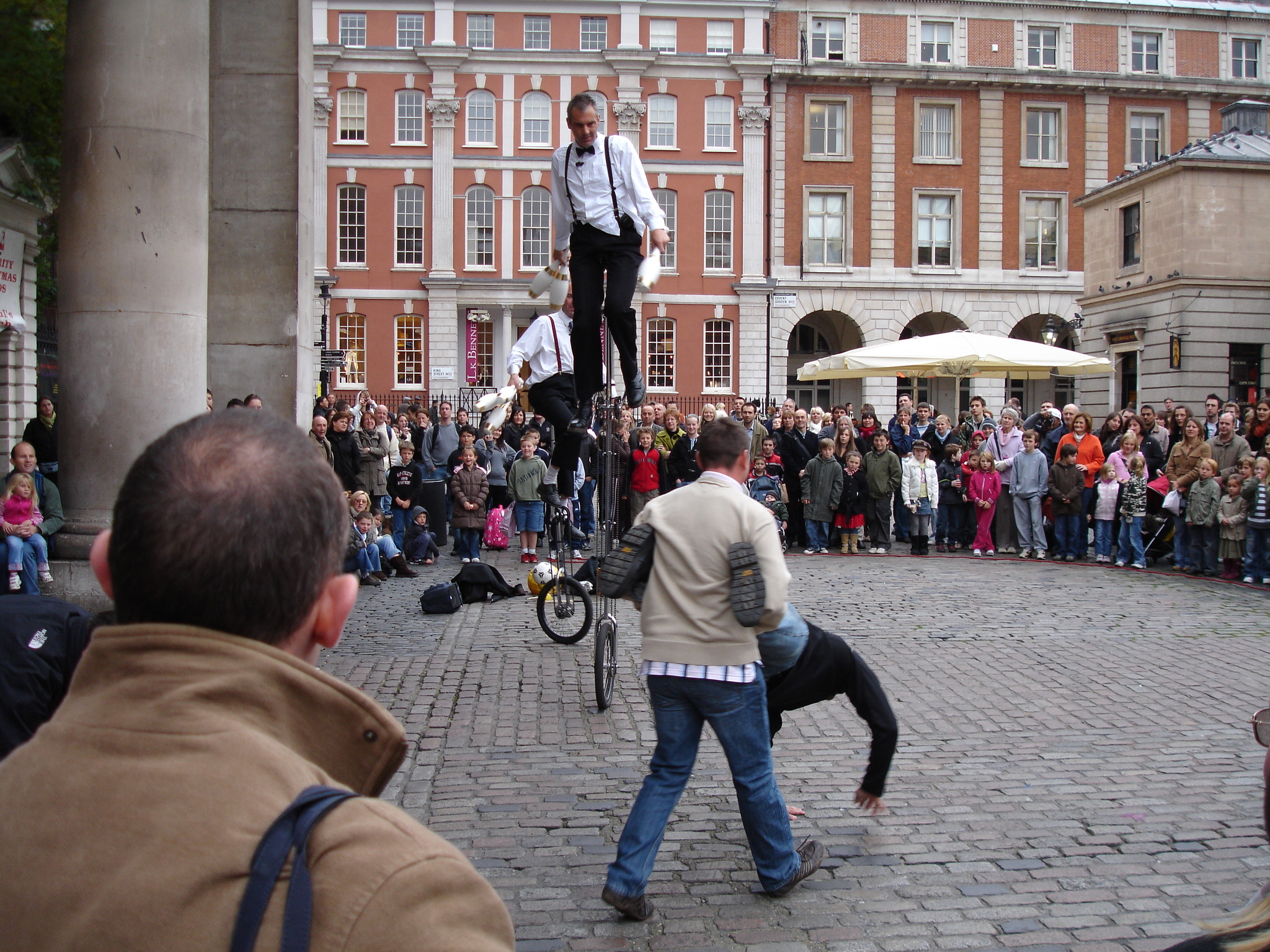 act